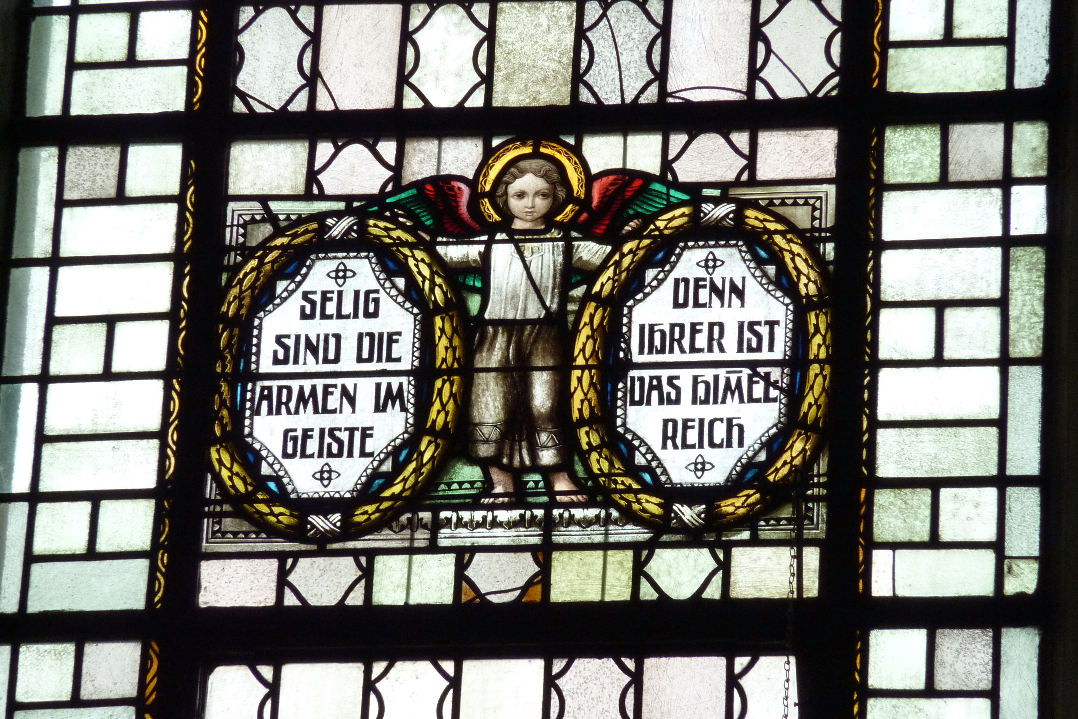 Bleiglasfenster in der katholischen Pfarrkirche St. Dionysius und Sebastian in Kruft, Darstellung (Ausschnitt): Seligpreisungen